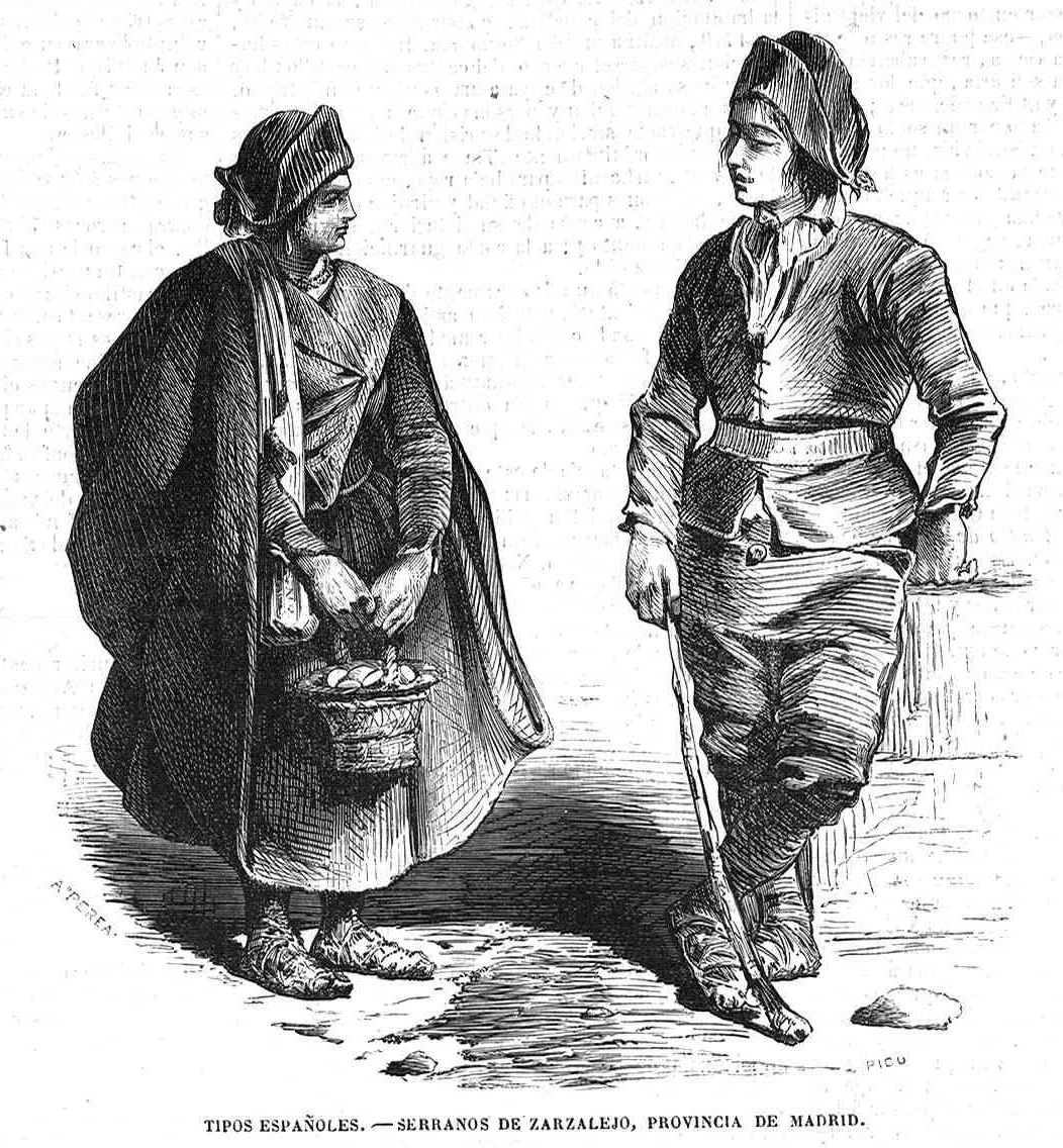 Tipos españoles, serranos de Zarzalejo, provincia de Madrid, en la revista española El Museo Universal.